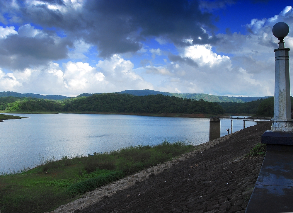 പൂർണ്ണമായും മണ്ണുകൊണ്ടു നിർമിച്ച കേരളത്തിലെ അപൂർവം അണക്കെട്ടുകളിൽ ഒന്നാണ് വാഴാനി ഡാം. തൃശൂർ ജില്ലയിൽ തലപ്പിള്ളി താലൂക്കിൽ തെക്കുംകര പഞ്ചായത്തിൽ, വടക്കാഞ്ചേരി പട്ടണത്തിൽ നിന്ന് 10 കി.മി അകലെയായാണ് ഈ അണക്കെട്ട് സ്ഥിതിചെയ്യുന്നത്.